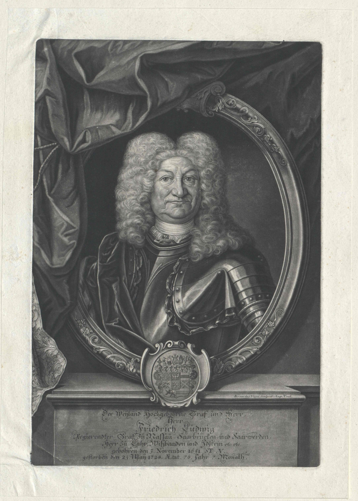 Graf Friedrich Ludwig von Nassau-Ottweiler (1651-1728)